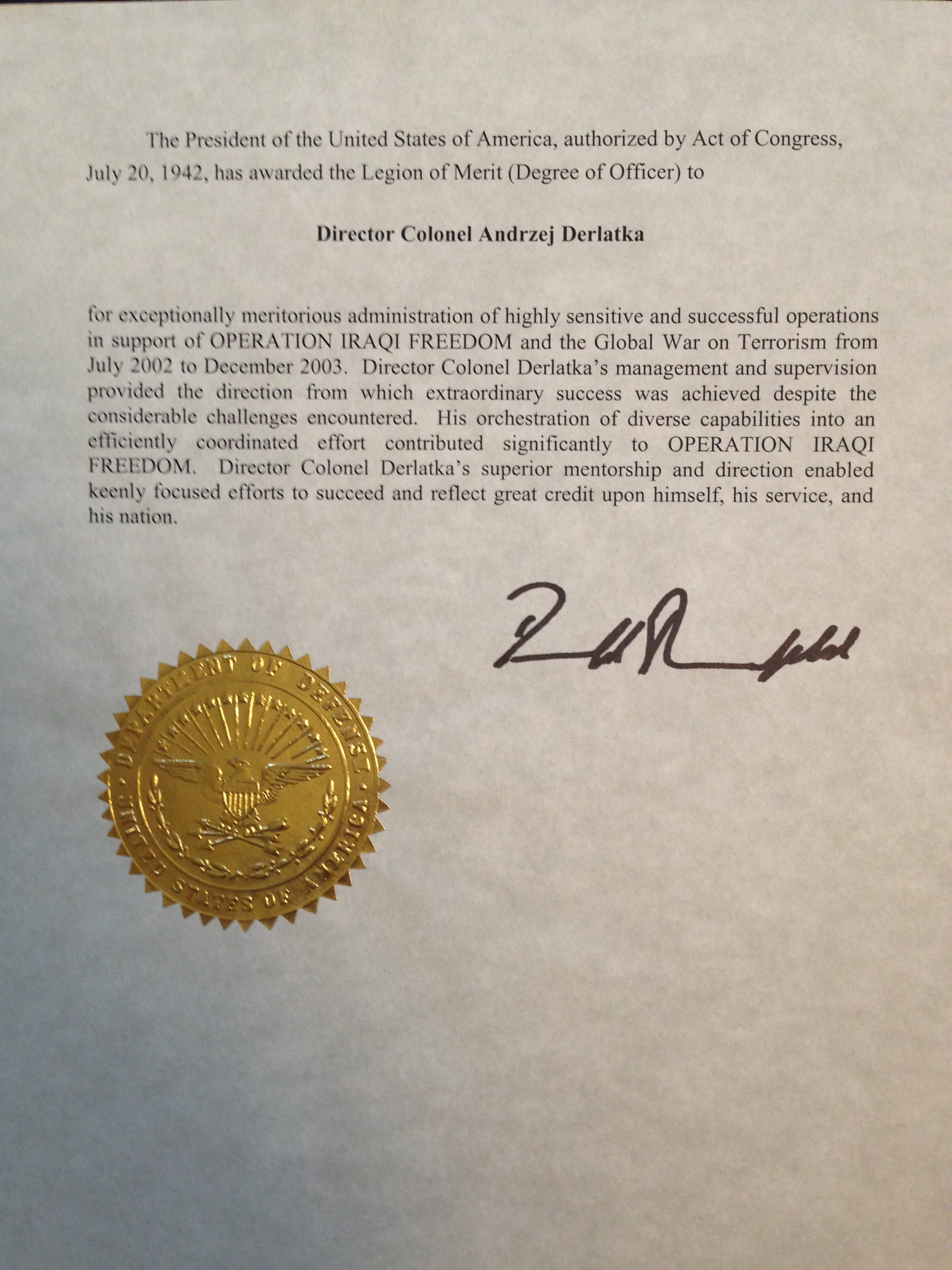 Legion of Merit (Stopnia Oficerskiego) w dn. 13.02.2004 r. nadany przez Prezydenta USA Georg'a Bush'a na wniosek Sekretarza Obrony USA Donald'a Rumsfeld'a (za skuteczne i pomyślne zarządzanie w okresie od lipca 2002 r. do grudnia 2003 r. działaniami polskiego wywiadu wspierającymi "Operację Iraqi Freedom oraz Globalną Wojnę z Terroryzmem")"